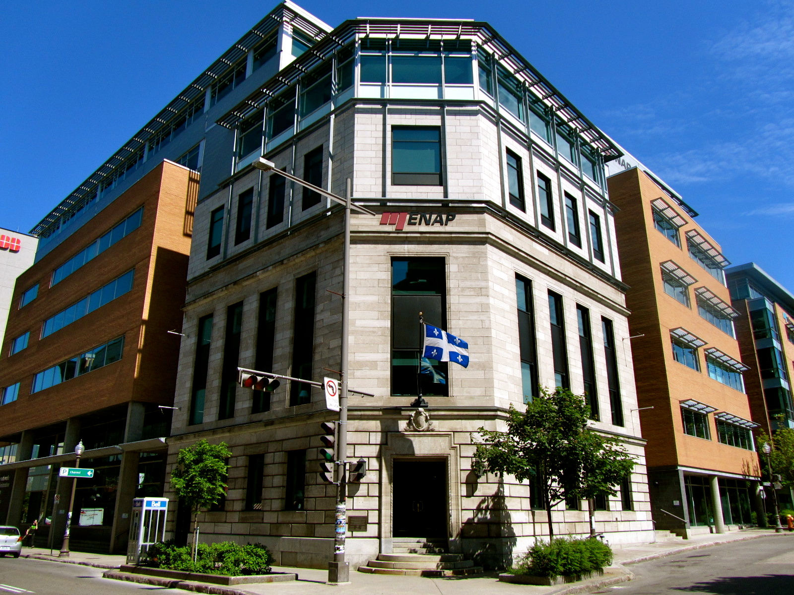 École nationale d'administration publique, 555 blvd Charest Est